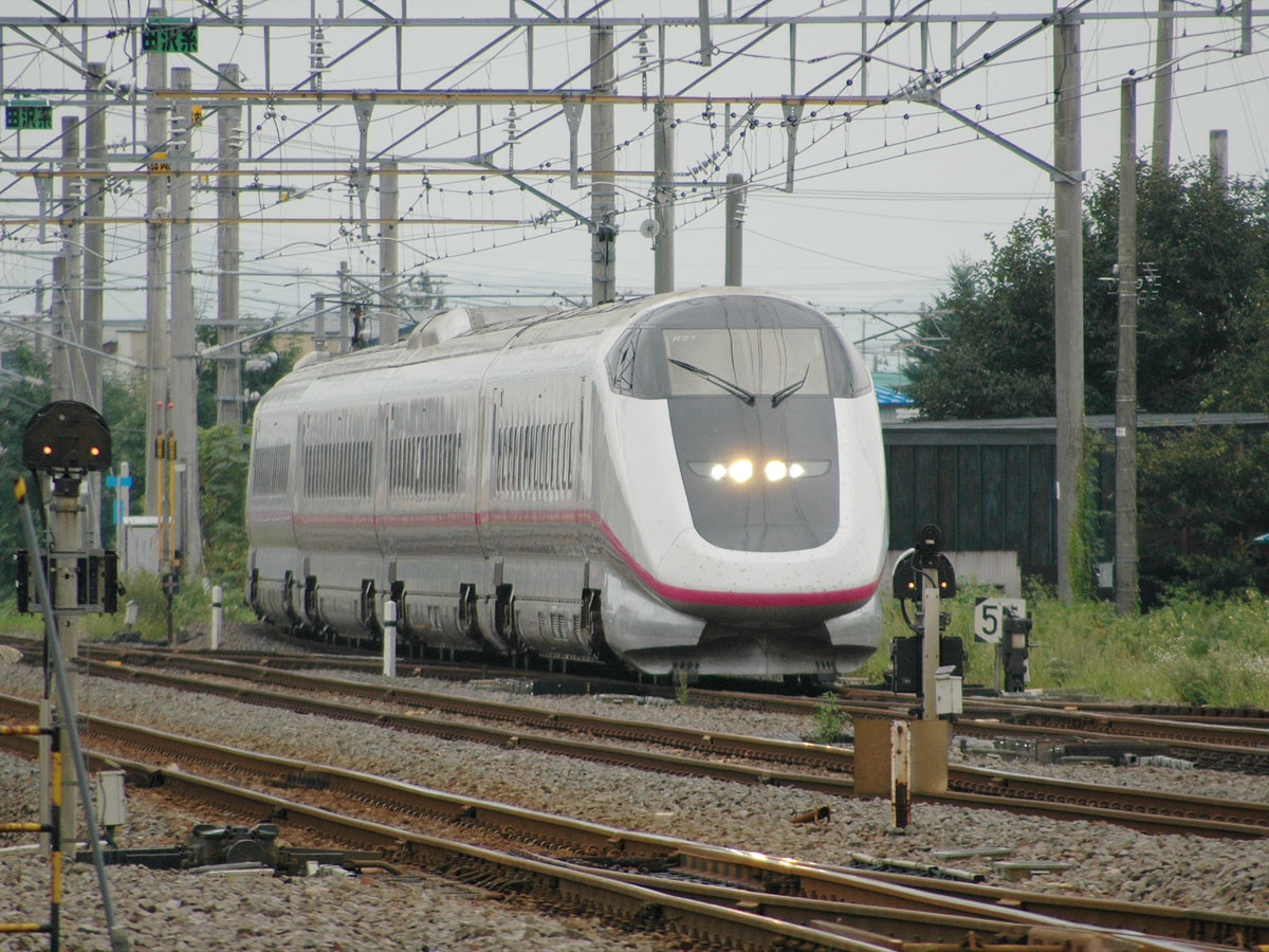 Akita Shinkansen Komachi at Omagari station. 2005/09/18